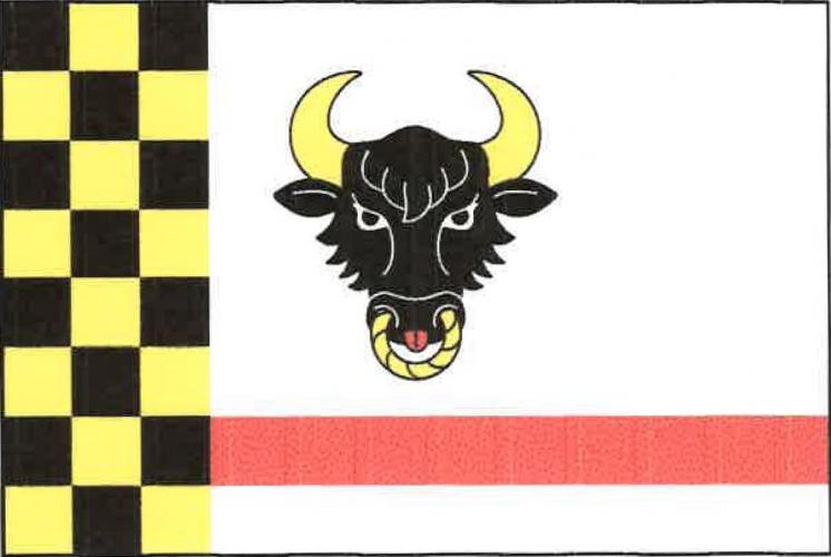 Žáravice vlajka